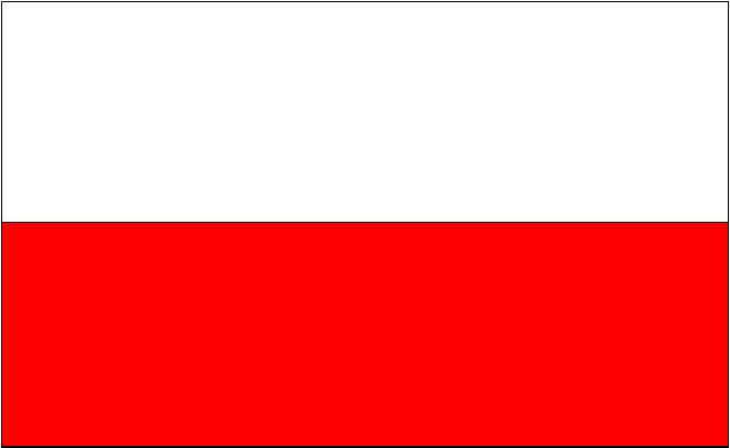 Fahne Aach (Hegau). Flaga Aach (Hegau).